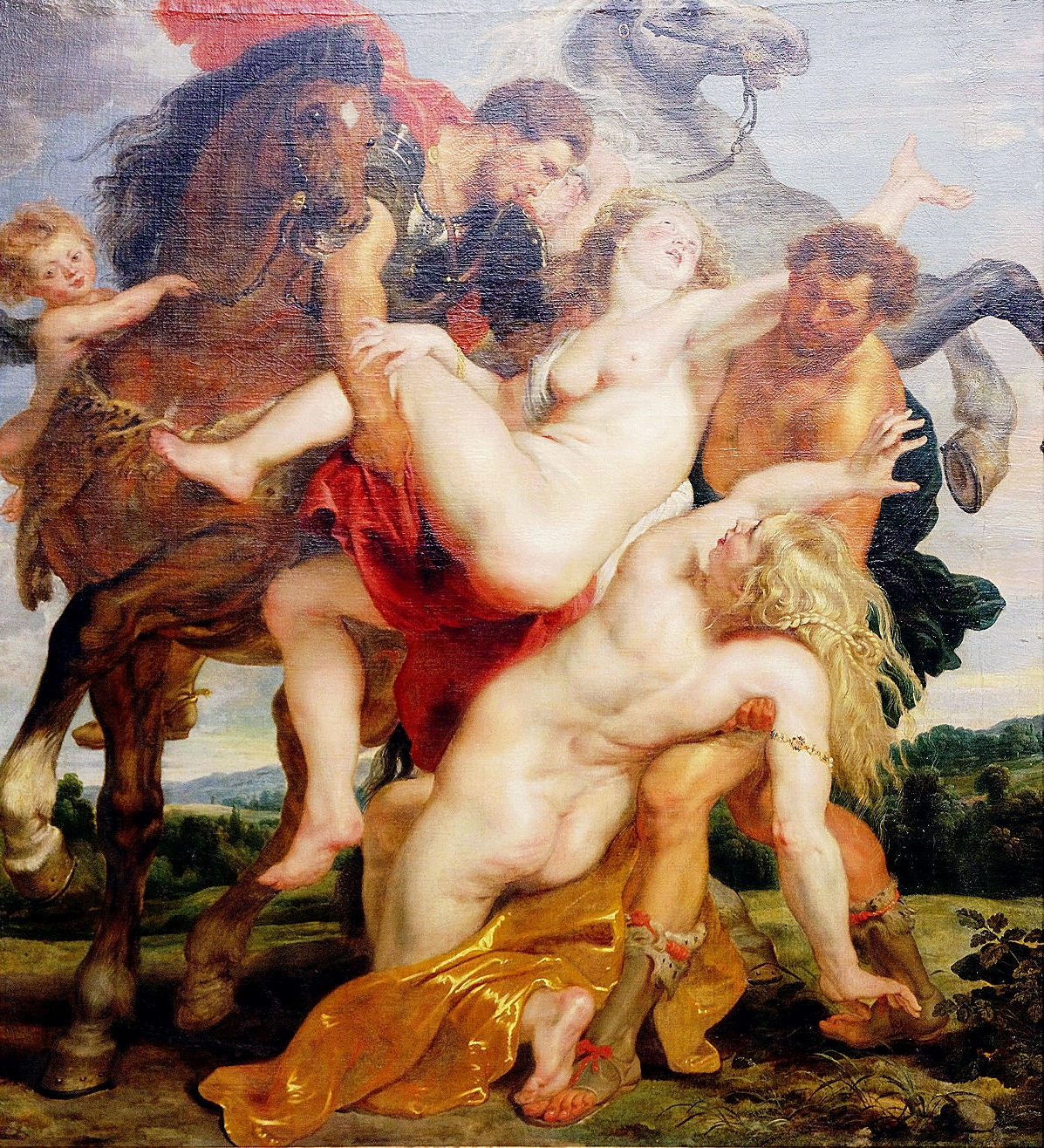 Levkippin qızının qaçırılması